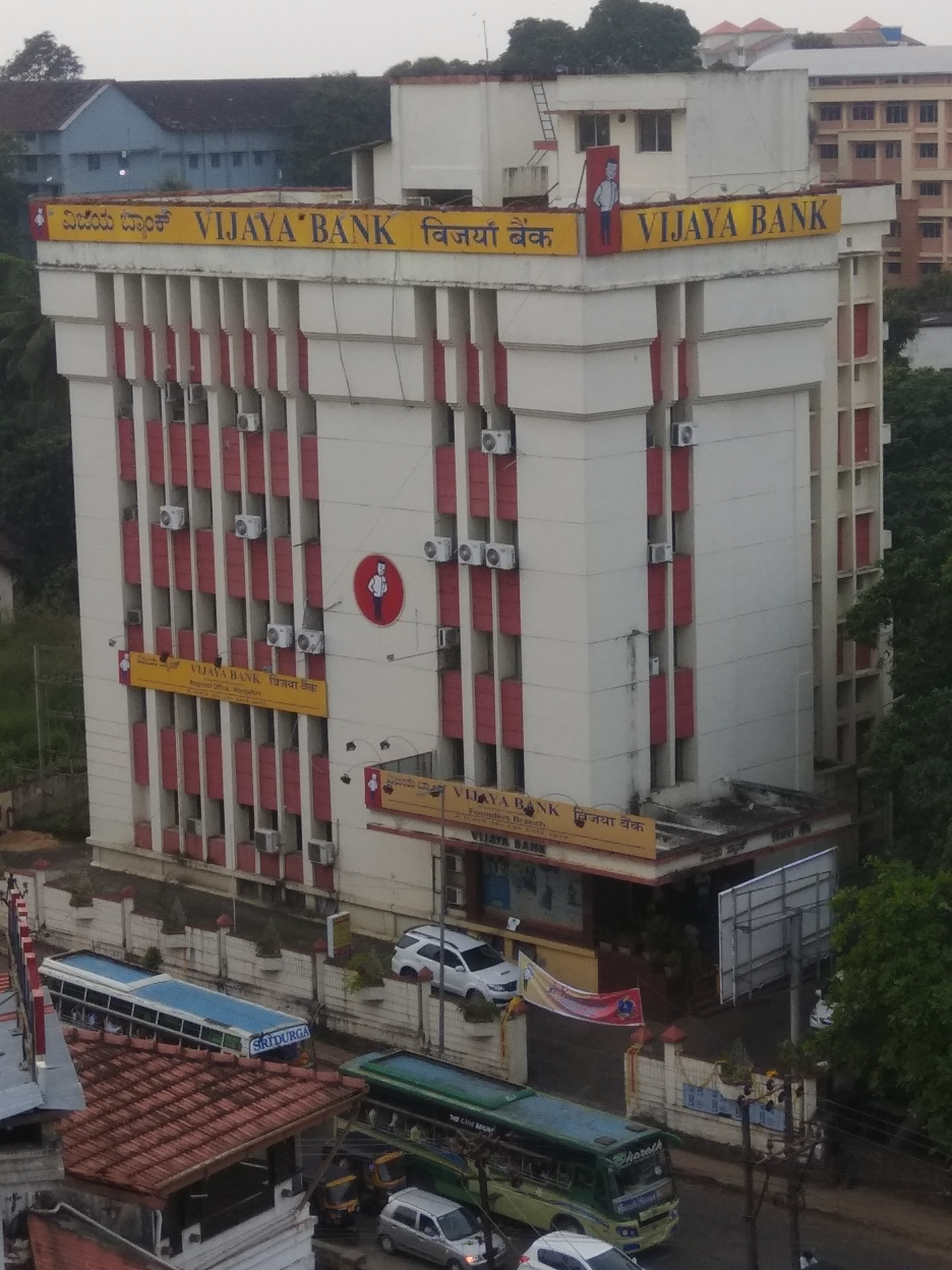 Founders Branch Bavuta Gudde , ವಿಜಯ ಬ್ಯಾಂಕ್ , ಪ್ರಾದೇಶಿಕ ಕಛೇರಿ ಮಂಗಳೂರು